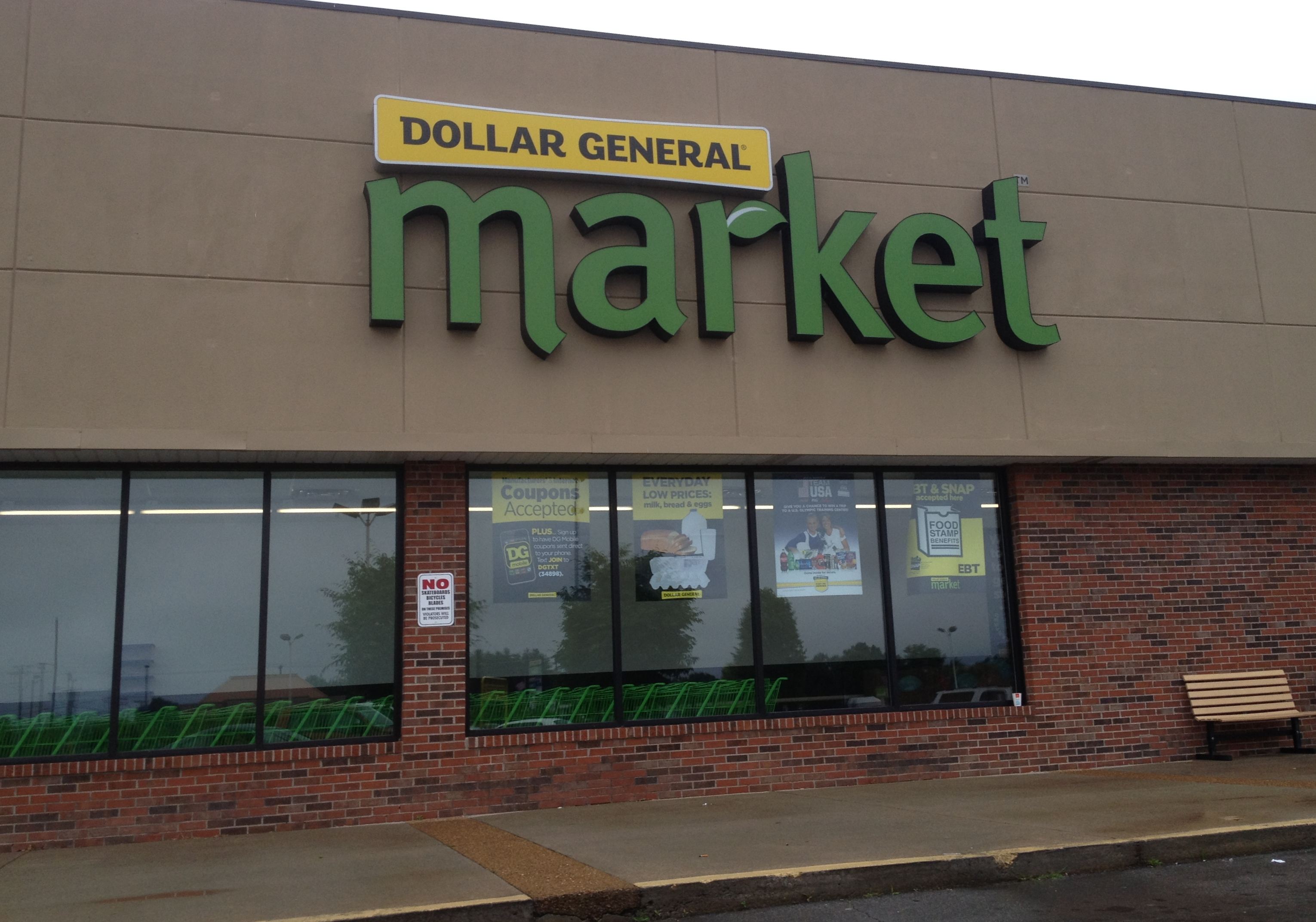 Dollar General Market Clarksville, TN